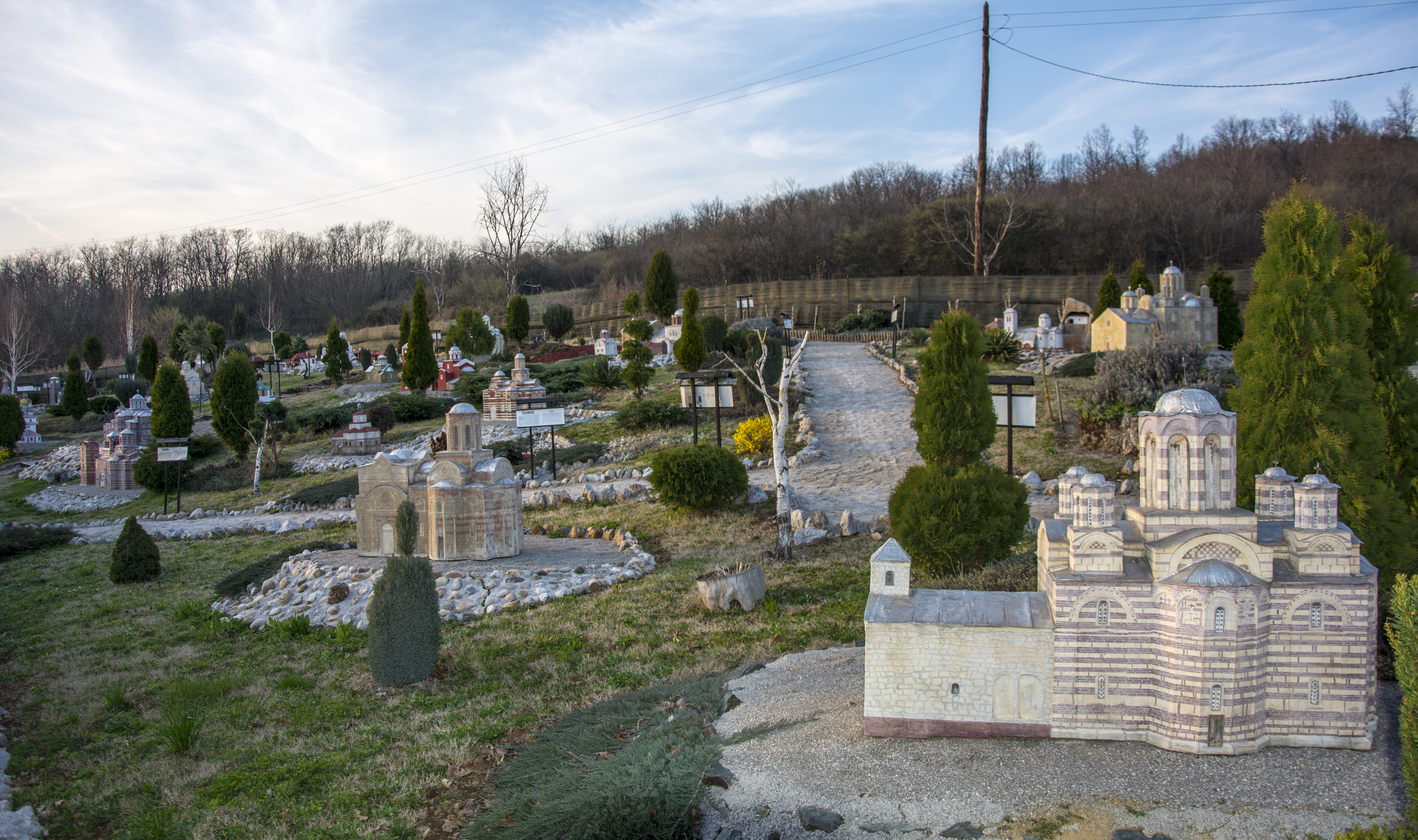 Парк макета, тренутна поставка: Средњовековни српски манастири, размера 1:17